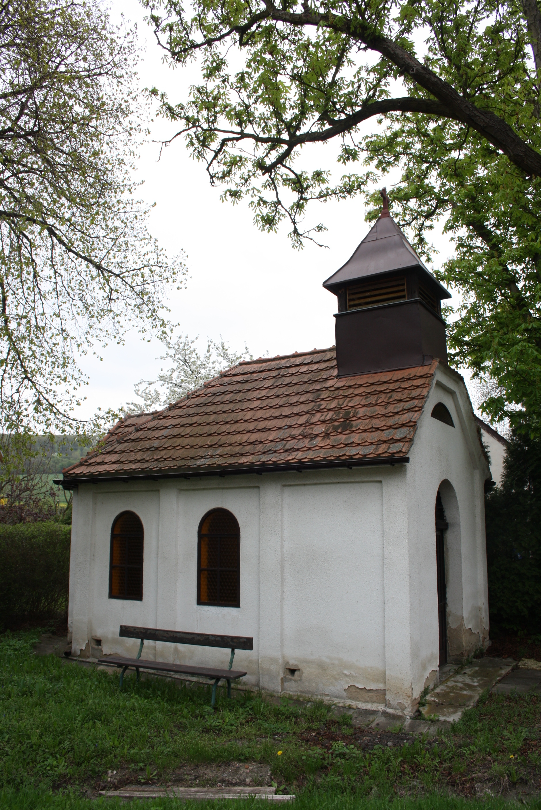 Kaplička v Třebutičkách (pohled od západu).